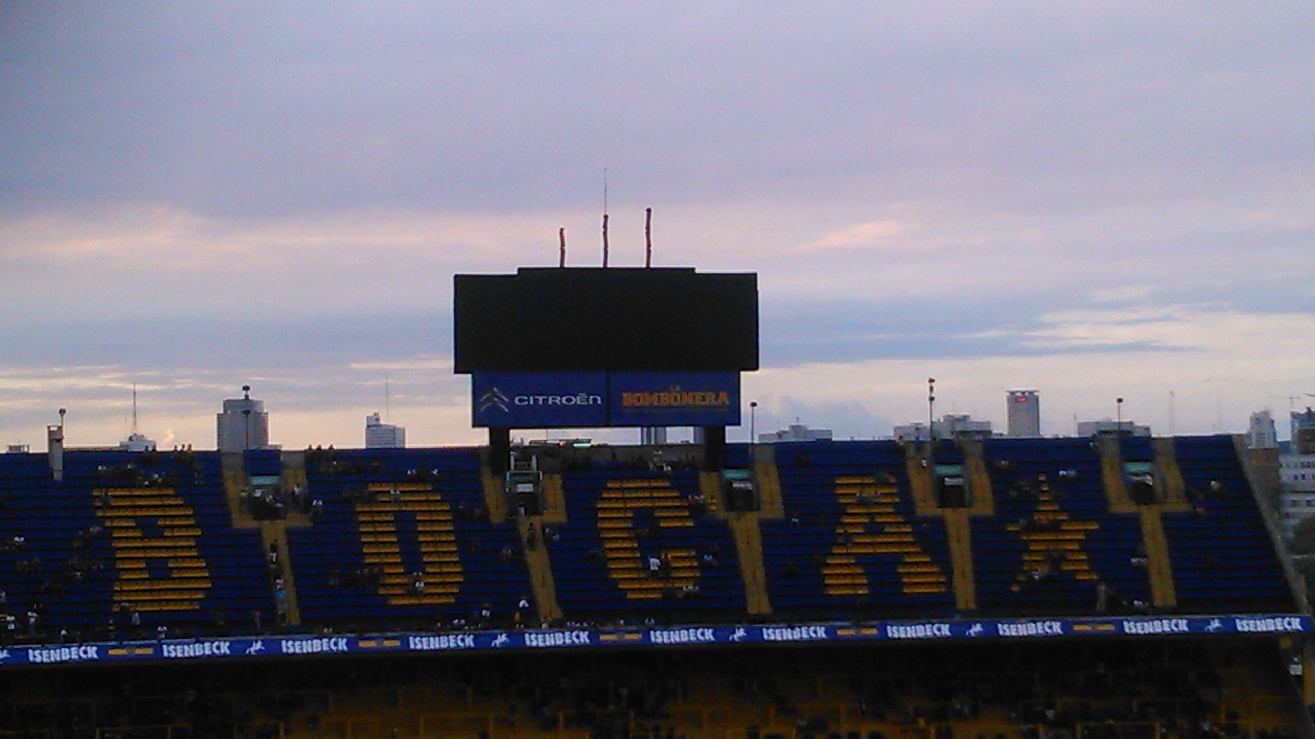 Pantalla de La Bombonera